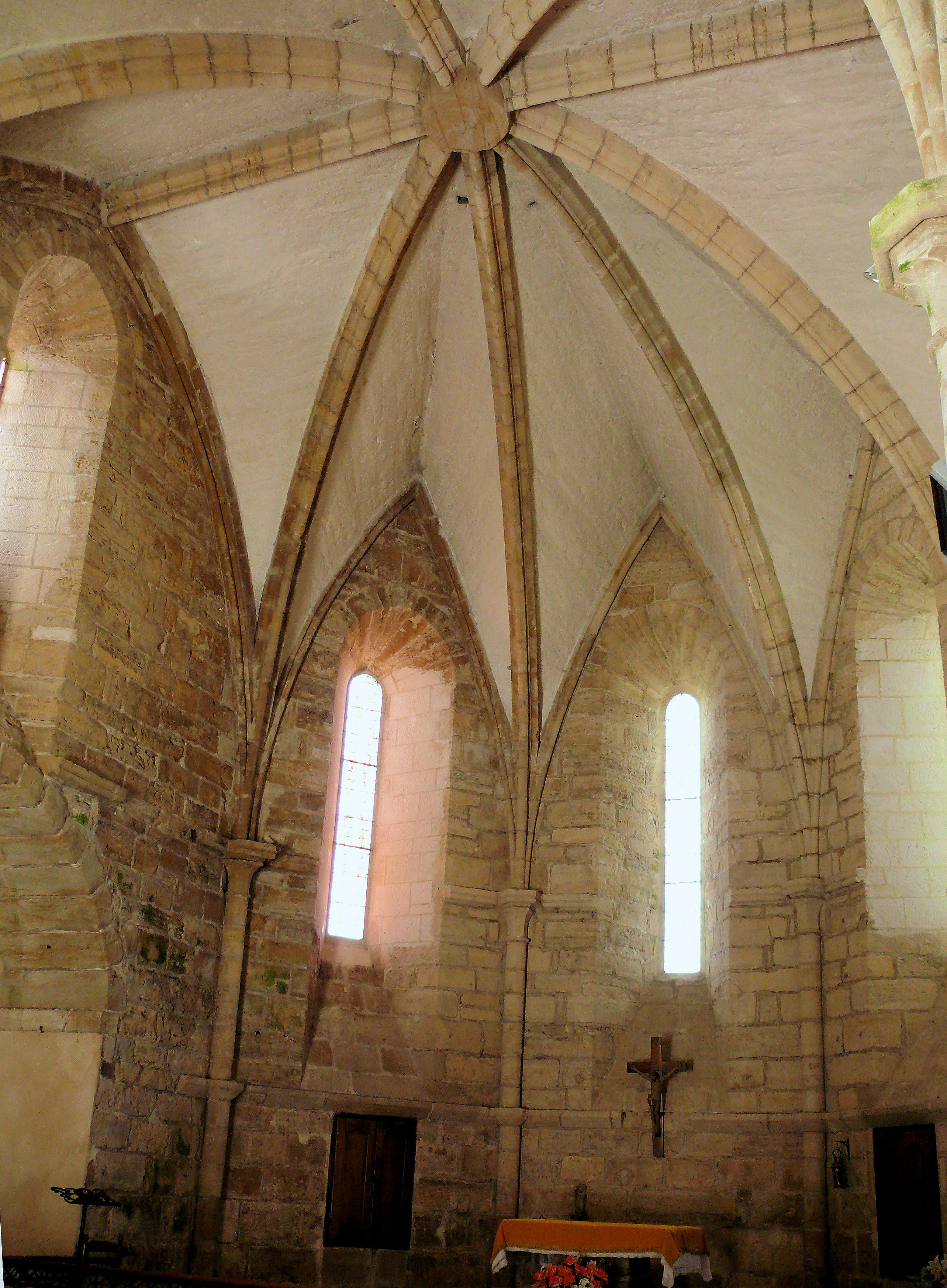 Rudelle - Eglise - Nef